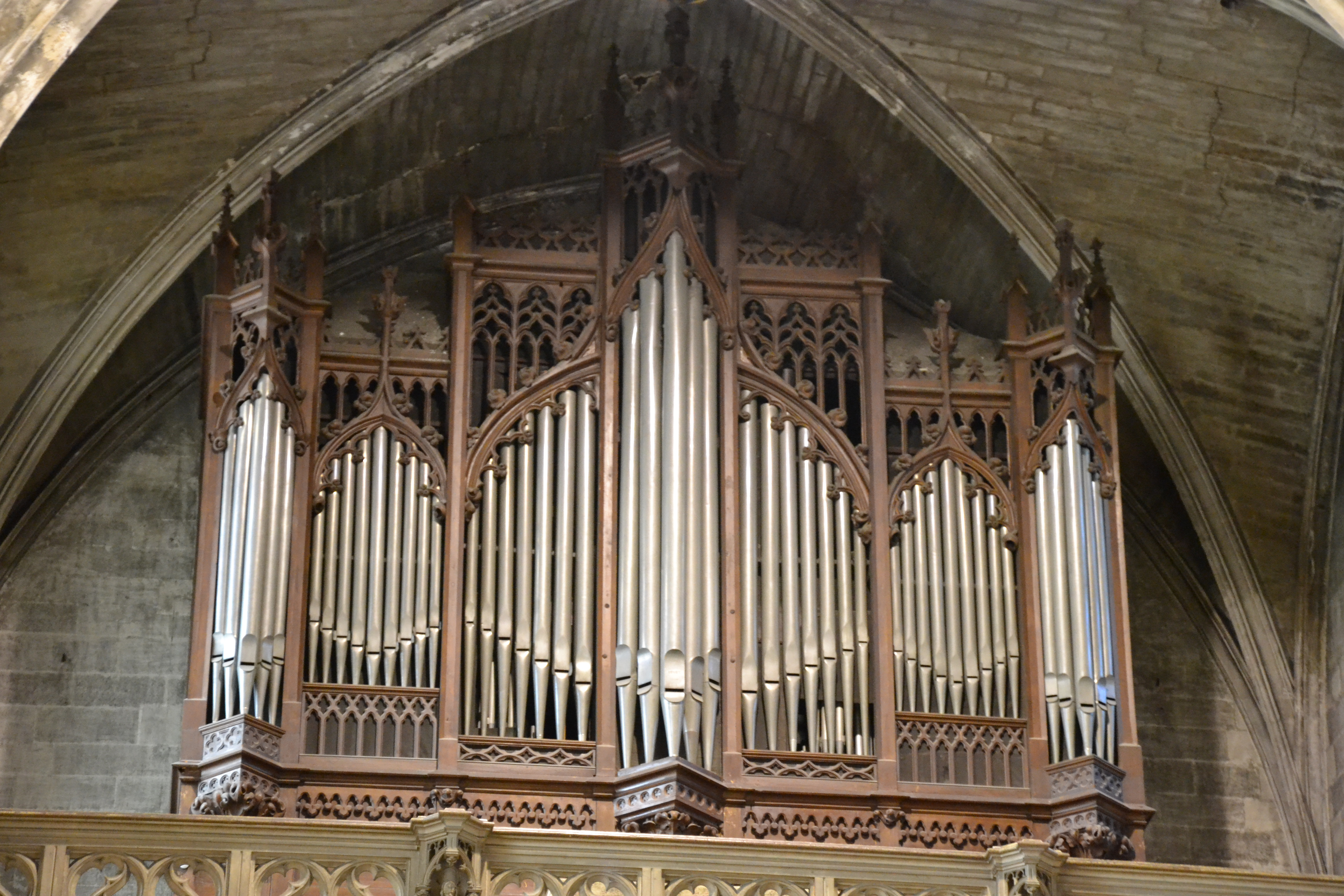 Collégiale Saint-Pierre (Classé)